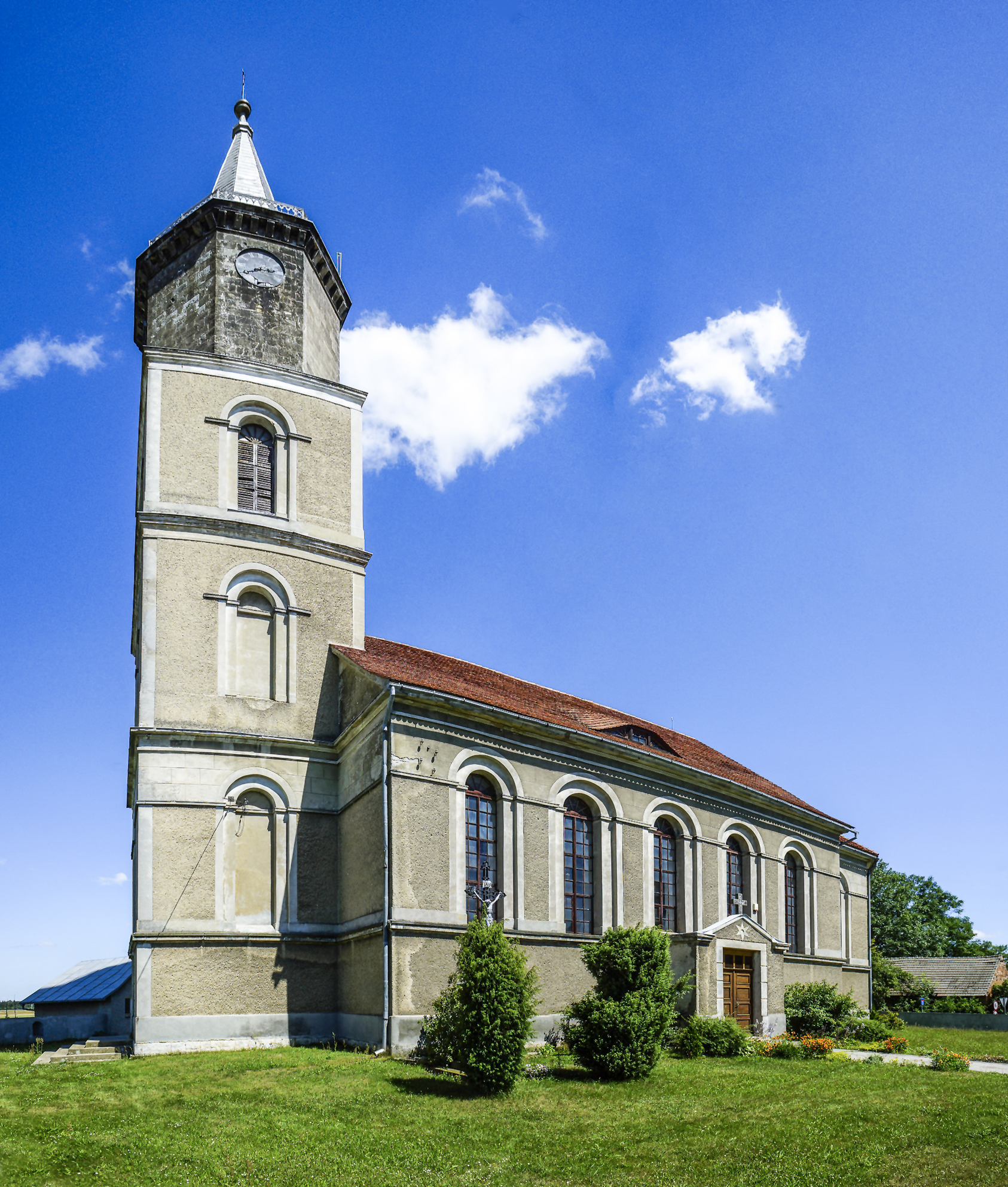 Godzieszów, kościół rzymskokatolicki p.w. Wniebowzięcia NMP.